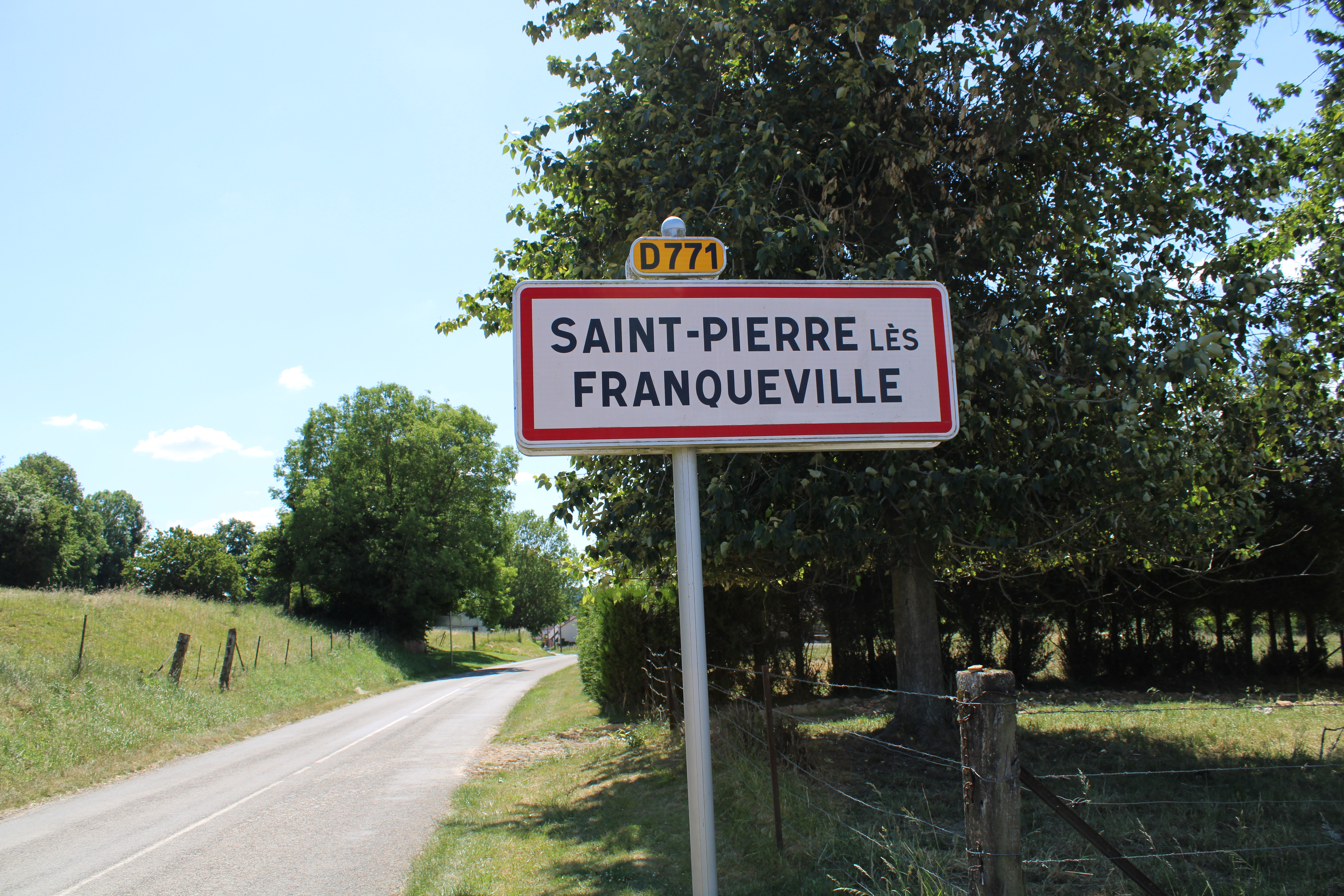 Entrée du village